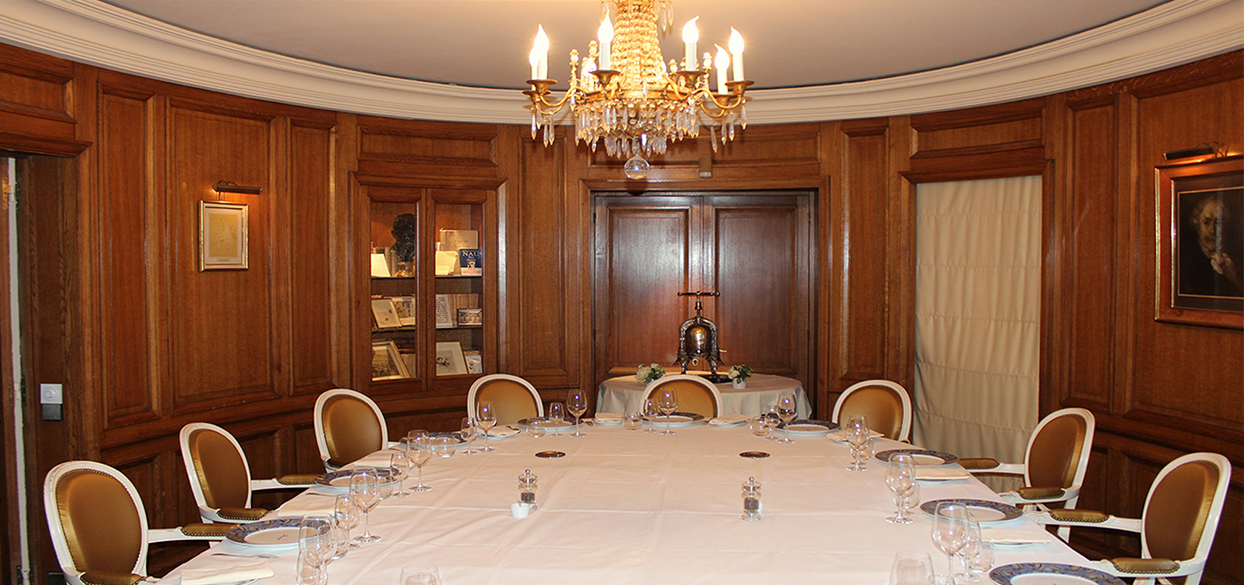 Prix de litterature Goncourt au drouant par antoine westermann à paris